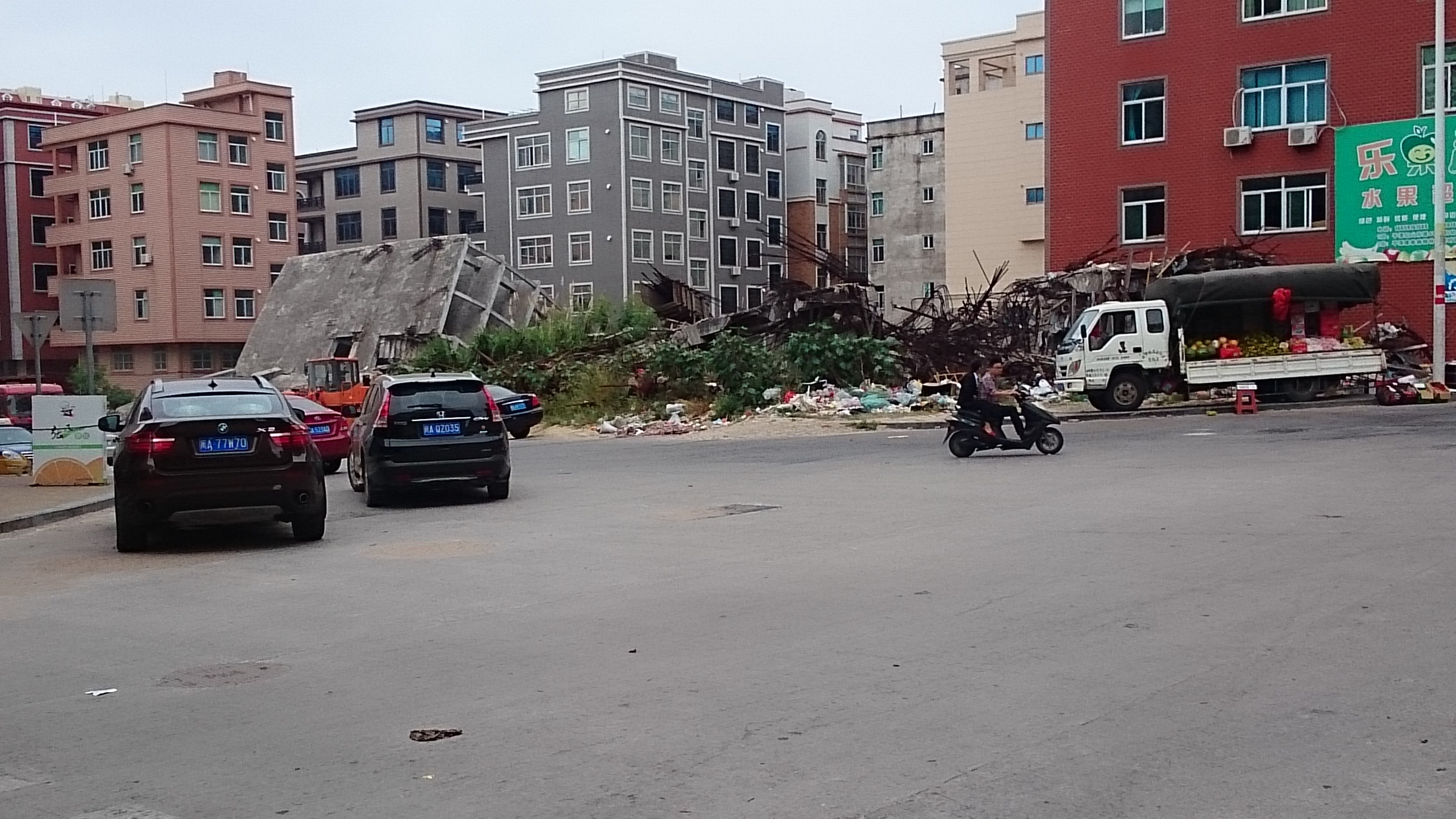 平潭綜合實驗區都更區